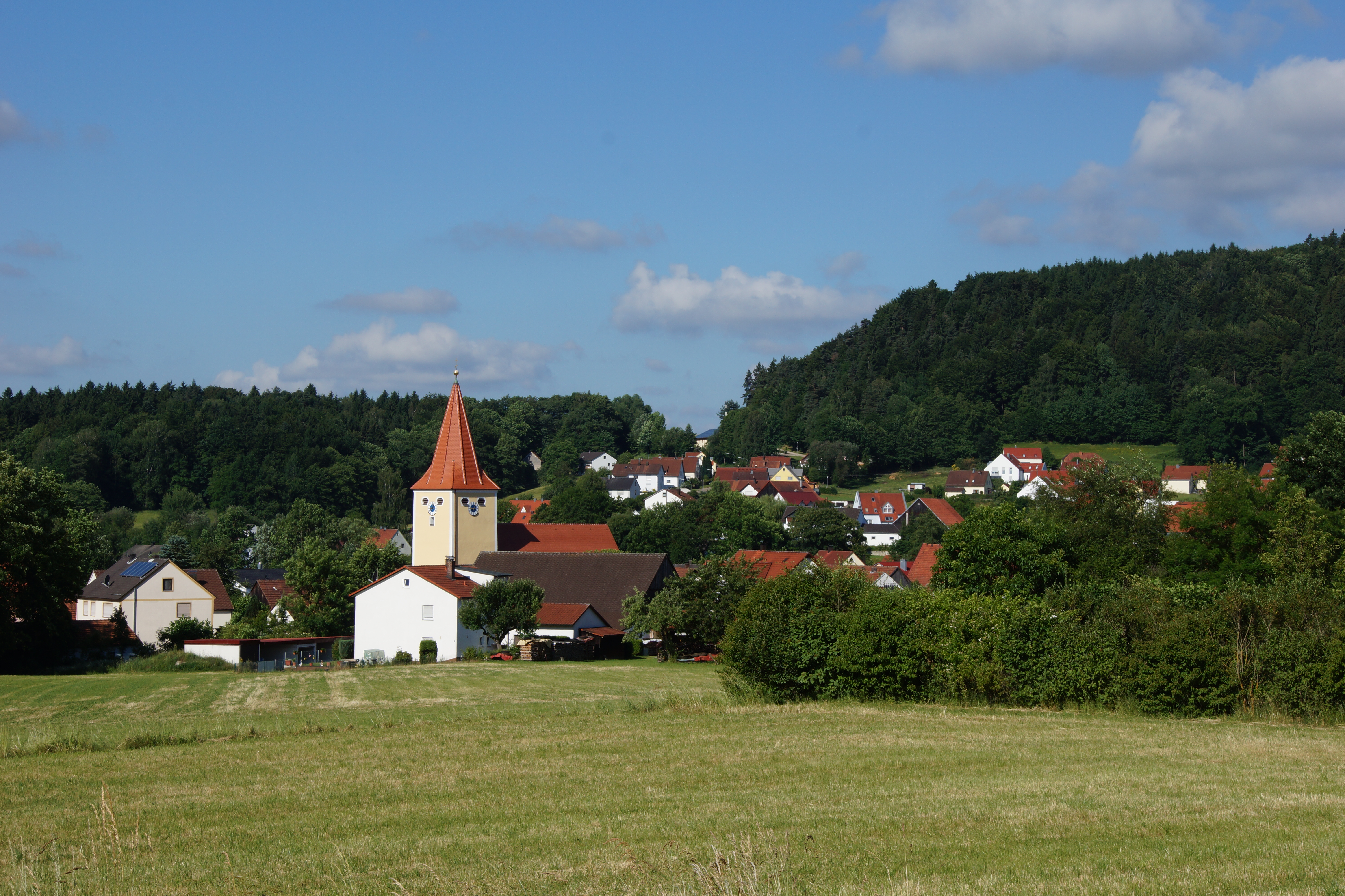 Blick auf Pilsach